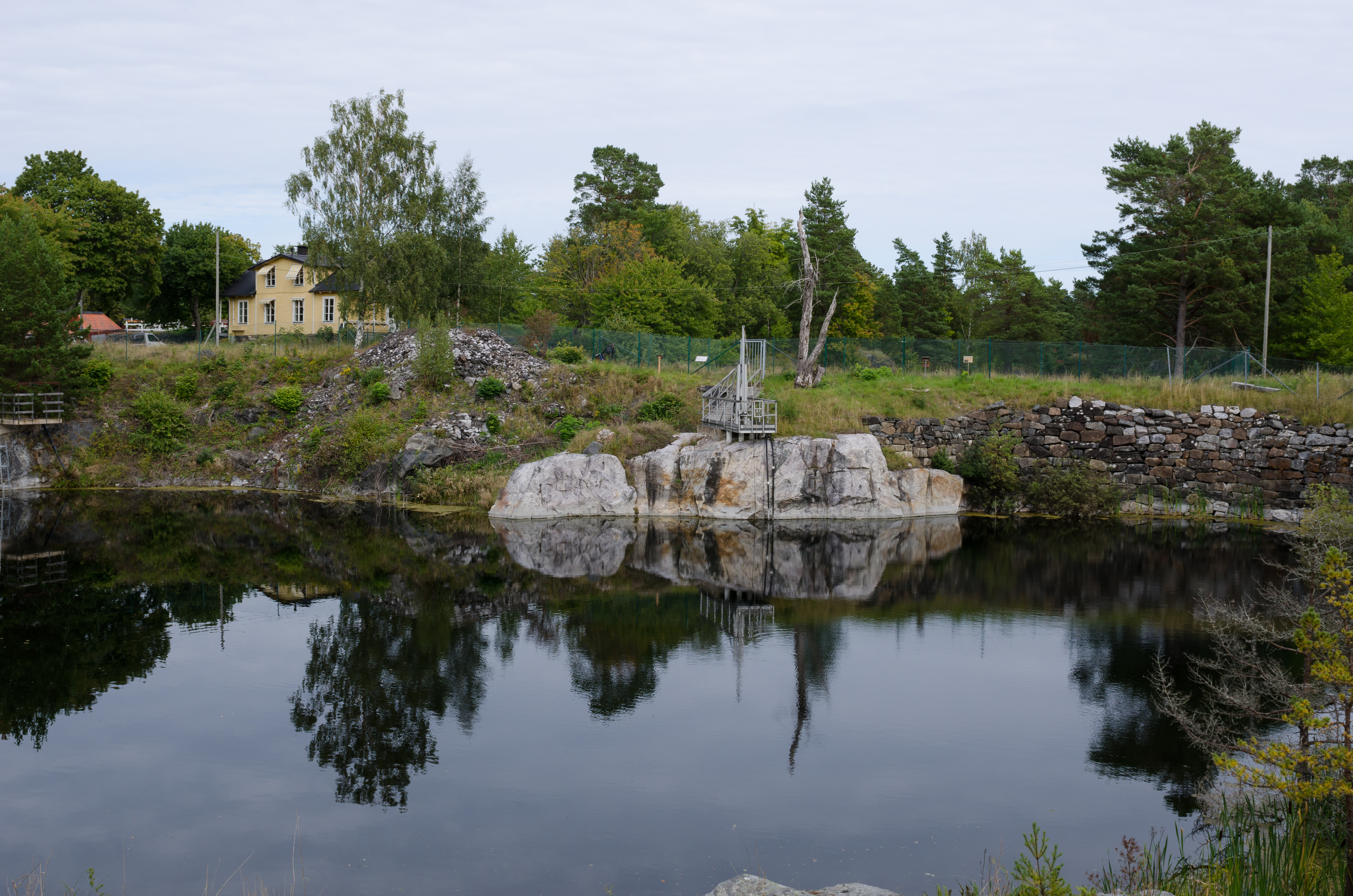 Nyköpingsgruva is a historic iron mine at Utö island and part of Utö Mines. Utö mines were opened in the 12th century and closed down in 1878. The element Lithium was first discovered here.